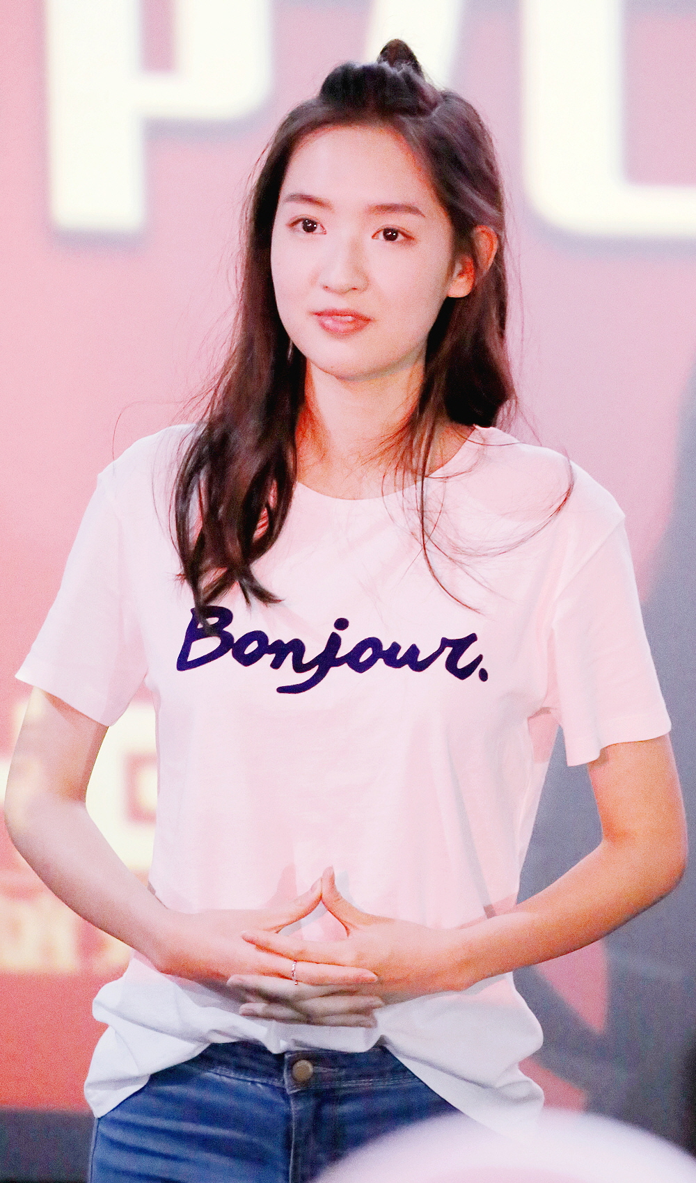 2018.03.24 遇见你真好 合肥路演 王玉雯